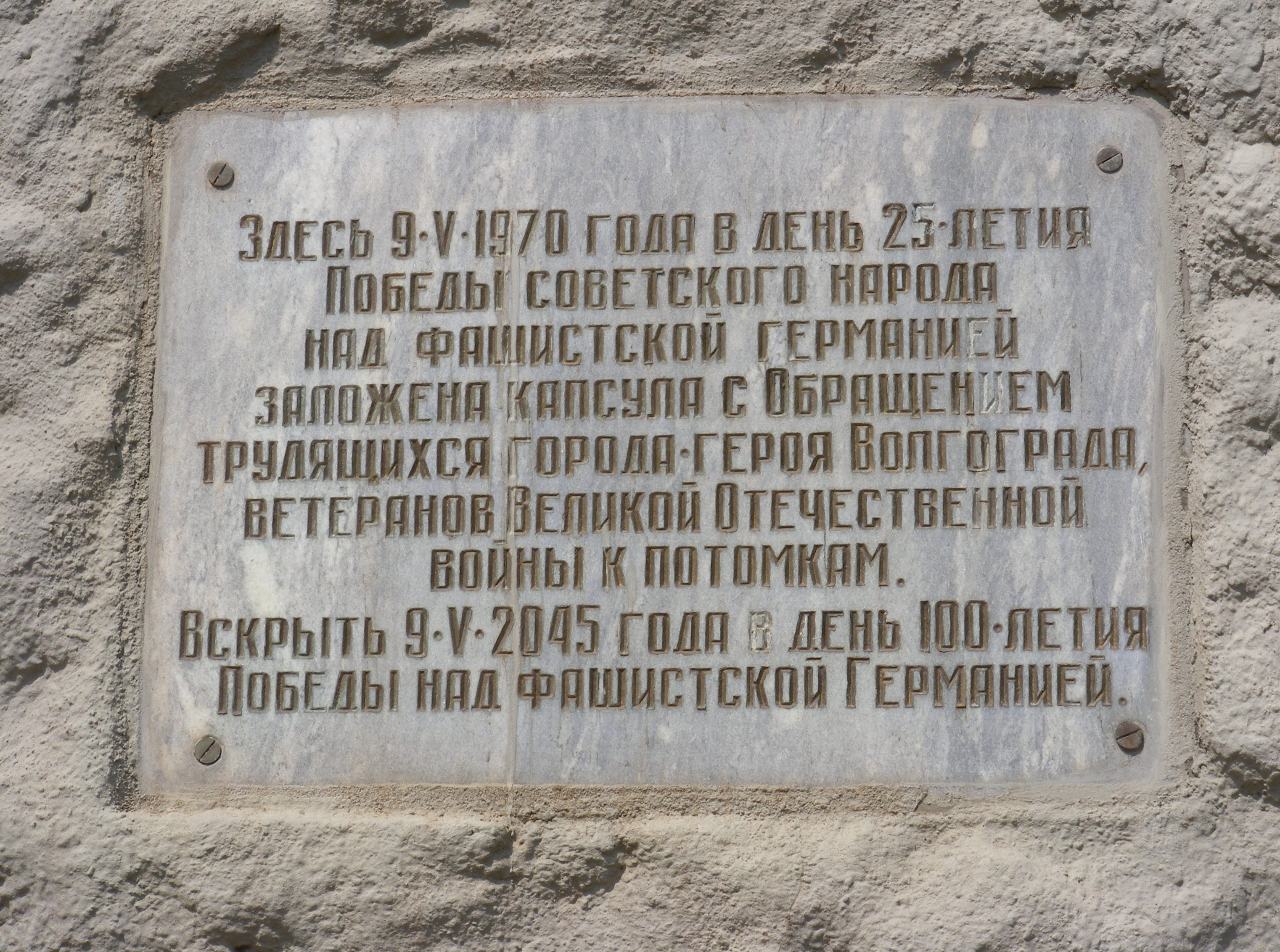 Мемориальная плита в месте закладки капсулы с обращением к потомкам в подпорной стене на Мамаевом Кургане.